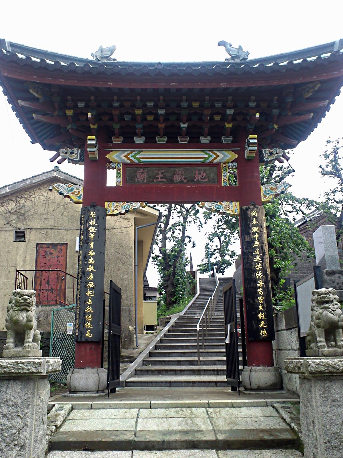 地蔵王廟門（神奈川県横浜市）